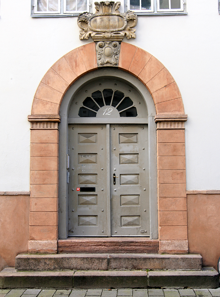 Portal, Borchs Kollegium, Store Kannikestræde, København.